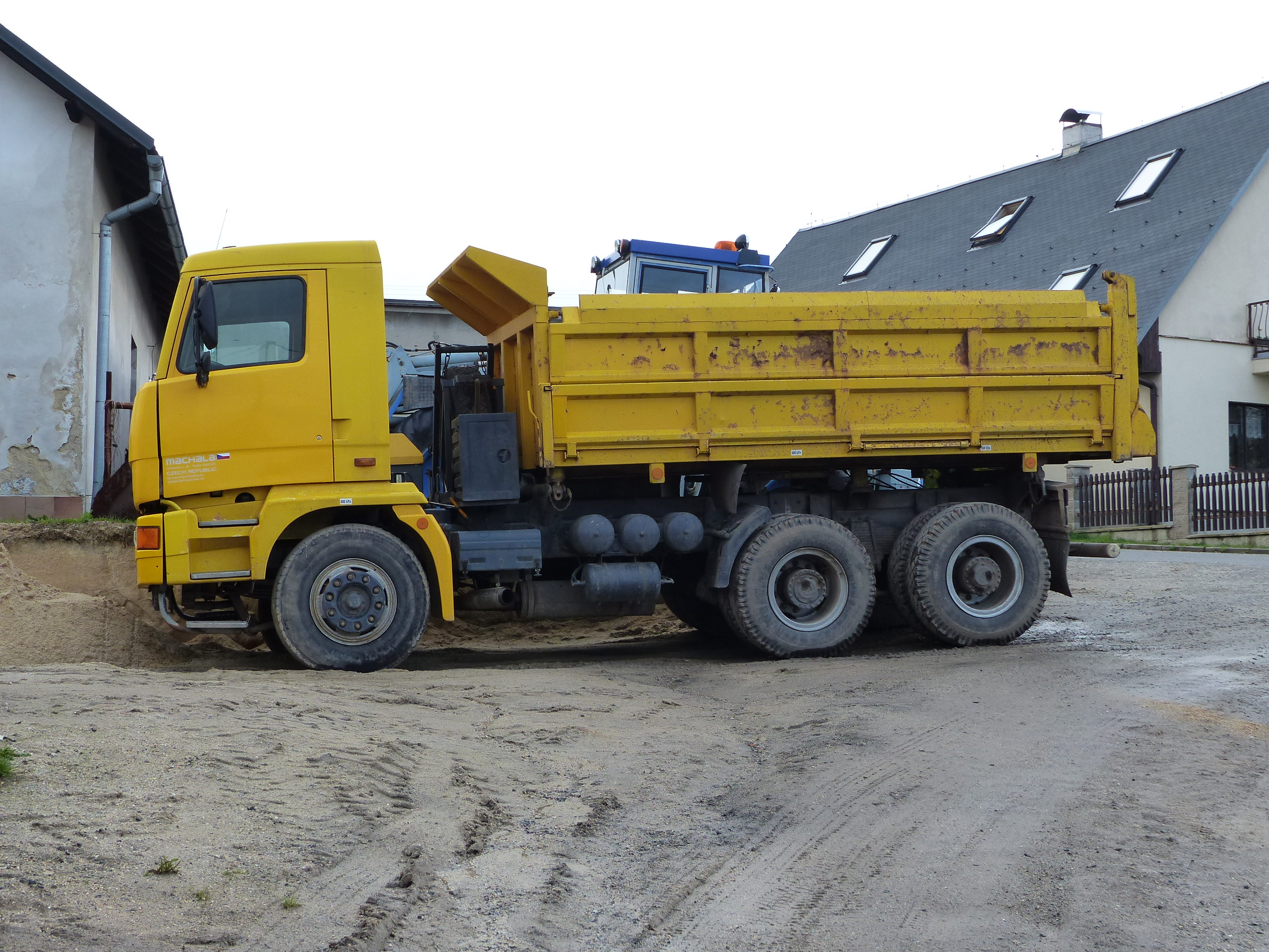 TEDOM 33.45 - jeden z mála vyrobených (možná i jediný) třínápravových nákladních vozů TEDOM 6×4, vycházející z řady LIAZ/Škoda 400. Motor Renault, převodovka ZF, rok výroby 2009.